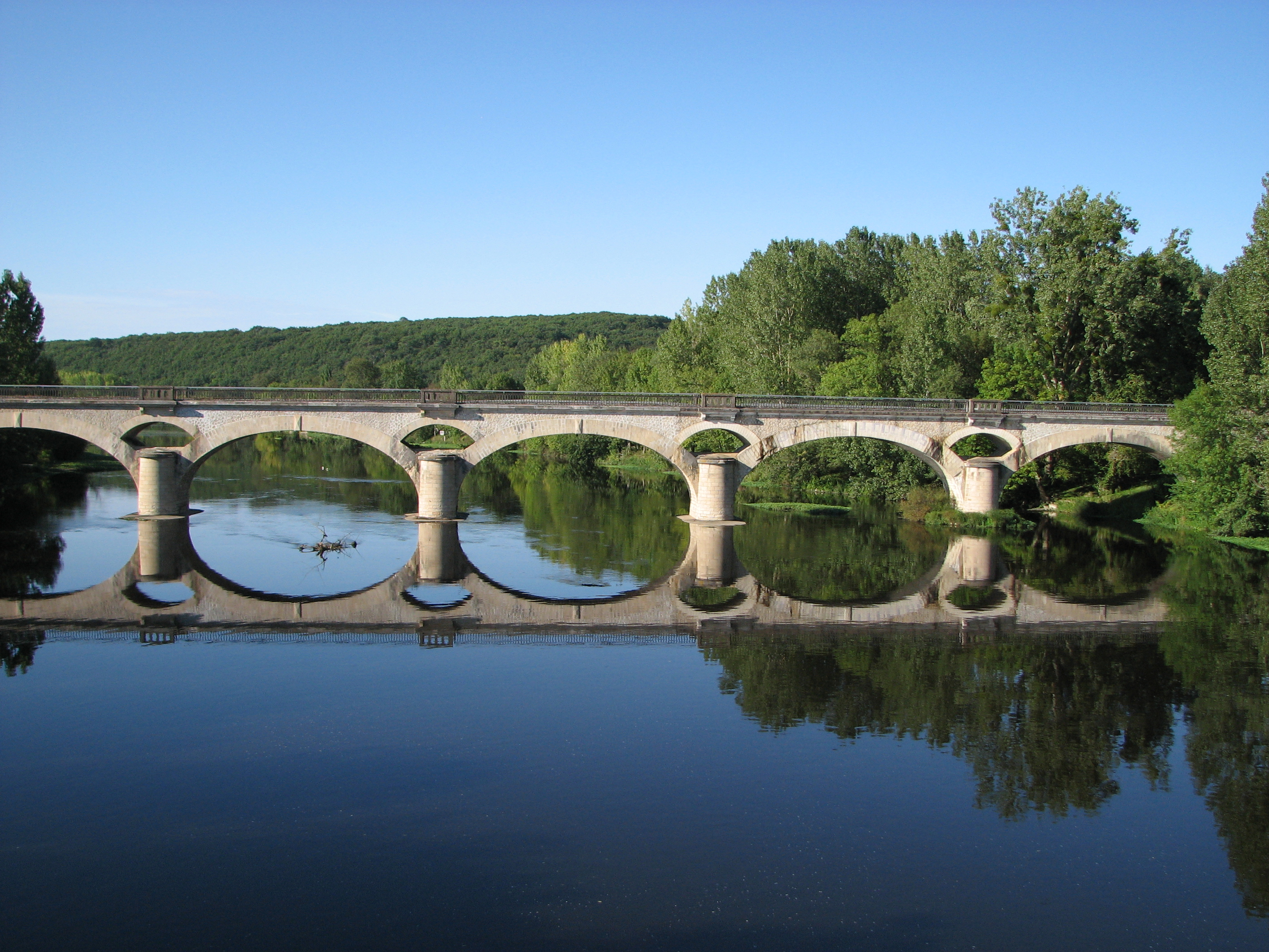 Pont ferroviaire sur la Vienne à Mazerolles (Vienne)